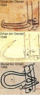 Entwicklung der beyze der Tughra aus mehreren Nun-Buchstaben